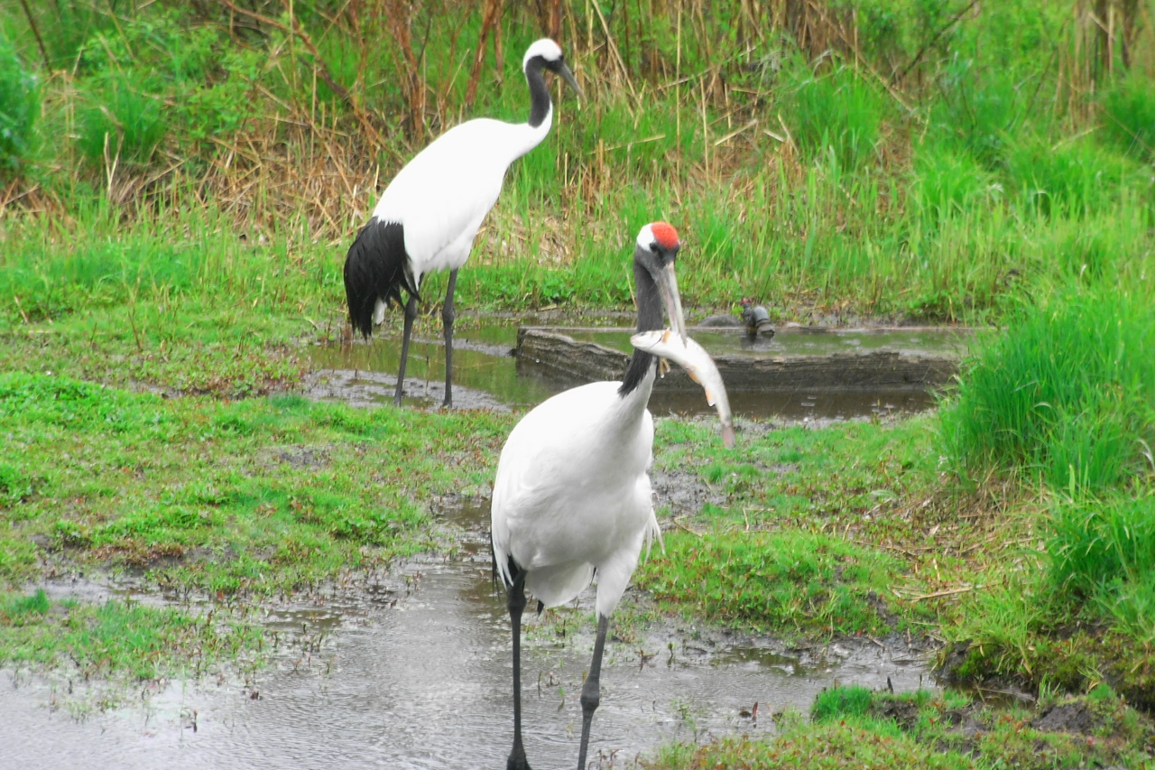 釧路の丹頂鶴自然公園の丹頂鶴。 手前の敦賀加えている魚は、この後トンビに奪われました。